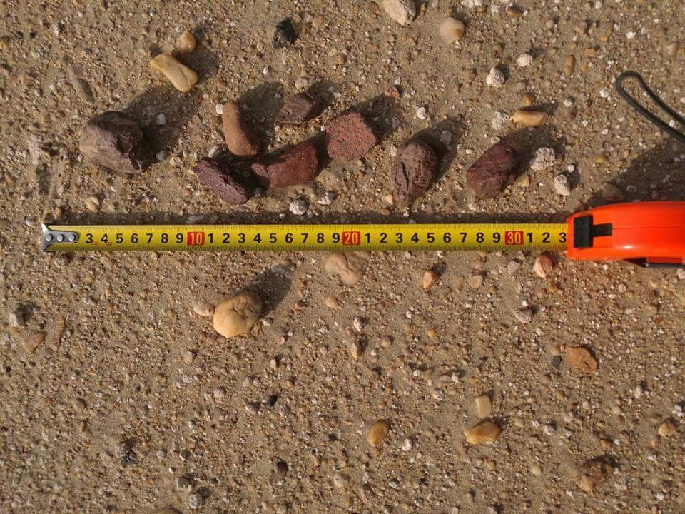 شظايا صخرية نارية مختلفة الاحجام والاشكال والالوان في الصحراء الجنوبية من العراق , منطقة الدبدبة ( غرب مدينة بصية العراقية ) 24- آب - 2016